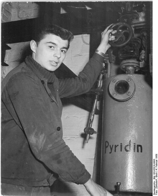 Zentralbild-Zühlsdorf Zü-Qu 4.2.1959 Produktionsverpflichtungen im VEB Berlin-Chemie. Die Werktätigen des VEB Berlin-Chemie in Berlin-Adlershof haben sich verpflichtet, ihre Produktion erheblich zu steigern. Das wird erreicht durch Anwendung der Seifert-Methode, Auswertung von Verbesserungsvorschlägen und durch technische und chemische Veränderungen. Allein durch die Verbesserung der Arbeitsorganisation erreicht die Abteilung Sulfonamide gegenüber sieben Ansätzen neuerdings acht Ansätze im Monat. Zehn Kollegen dieser Abteilung schliessen im Februar ihre Qualifizierung für einen zweiten Beruf ab und fünf weitere Kollegen werden in diesem Jahr zu einem Lehrgang delegiert. UBz. Der Chemiefacharbeiter Hans Engel hat seine Norm an der Pyridin-Rückgewinnungsanlage freiwillig um 10% erhöht und sich verpflichtet, alle anfallenden kleineren Reparaturen selbst auszuführen. Hans Engel wird vom Betrieb im September auf eine Ingenieurschule delegiert.